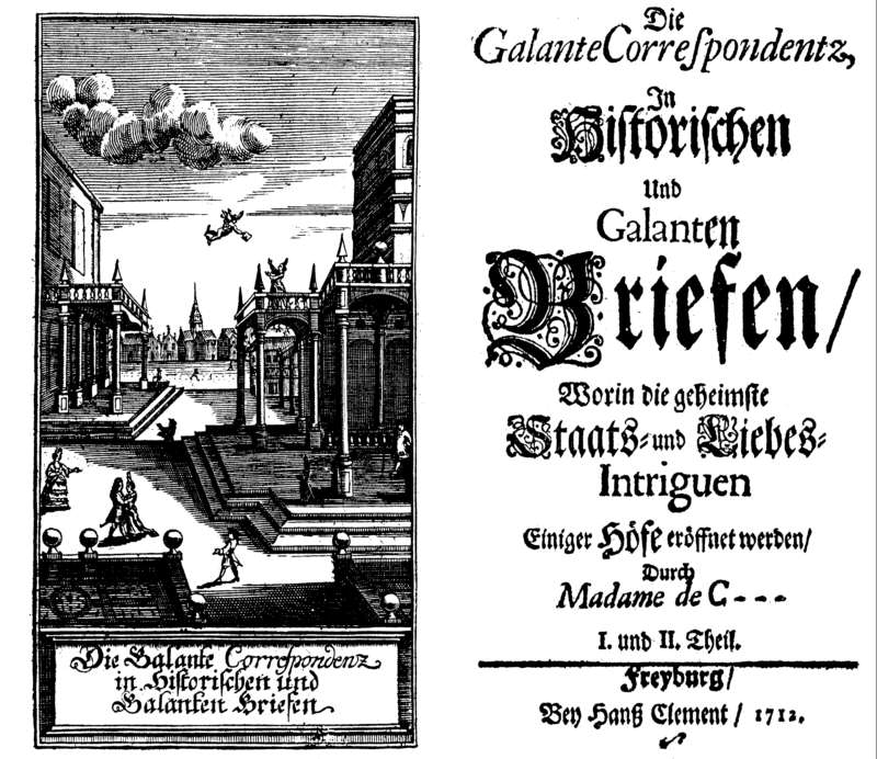 Bey Hanß Clement/ 1712. Original: DuNoyer, Anne Marguerite Petit Lettres historiques et galantes, par Madame de C**. Ouvrage curieux, 1-7 (Cologne [Den Haag]: P. Marteau, 1707-18).